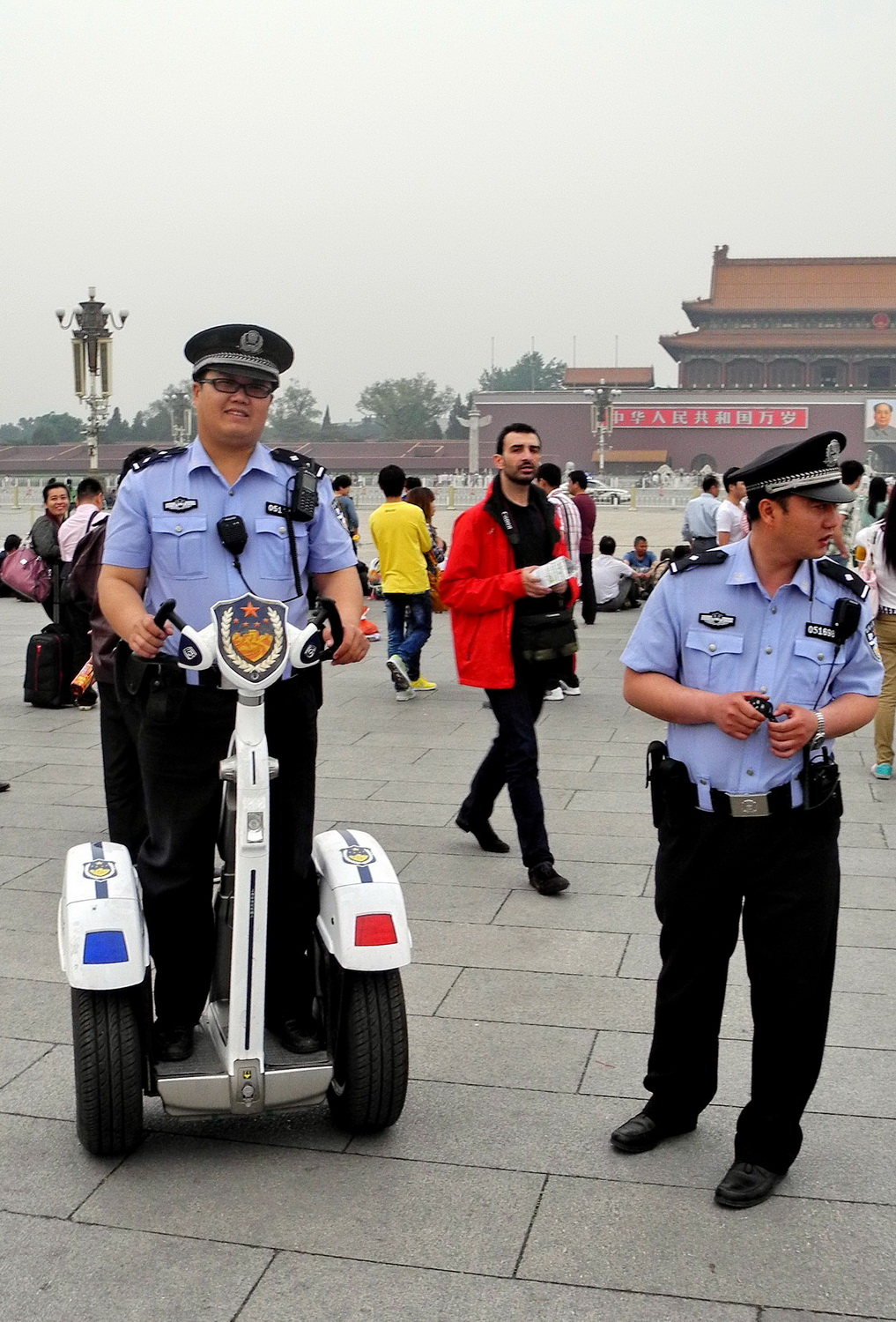 police montéé, Pékin, place Tien Ai Men